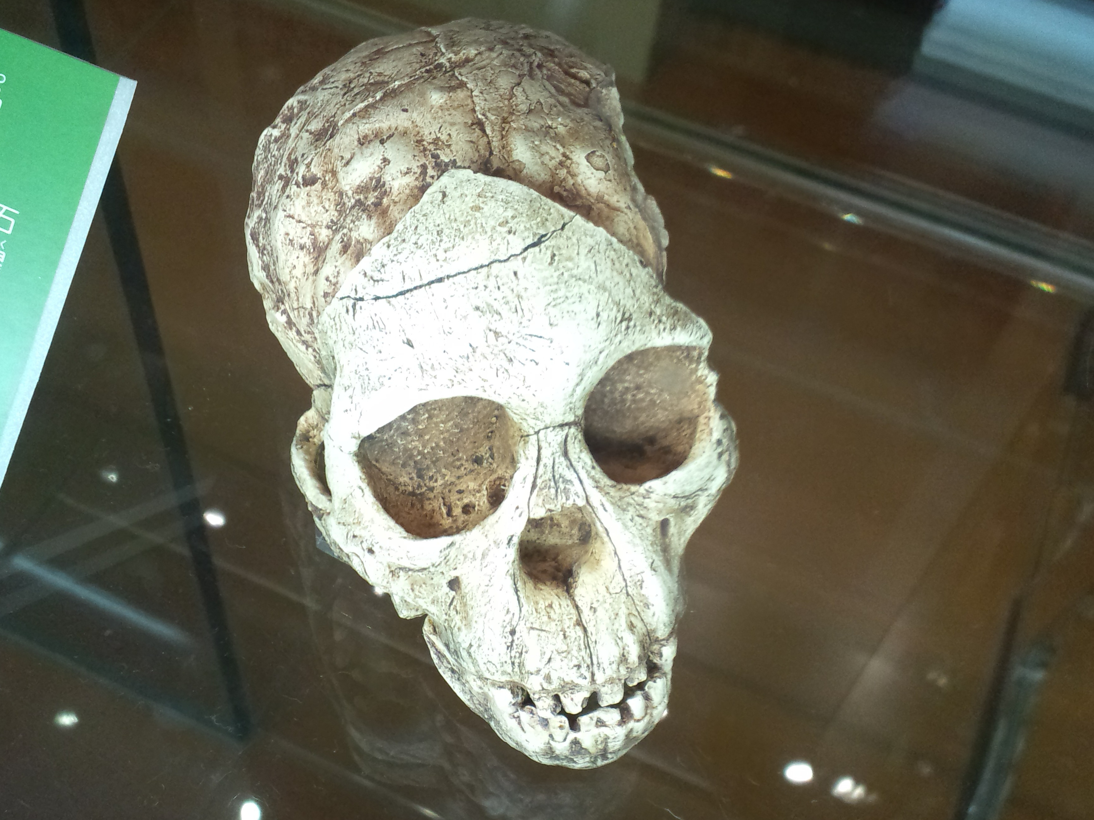 リトルワールド 本館展示室 アウストラロピテクスの頭蓋骨（1925年発見、複製、別名：タウング・チャイルド）